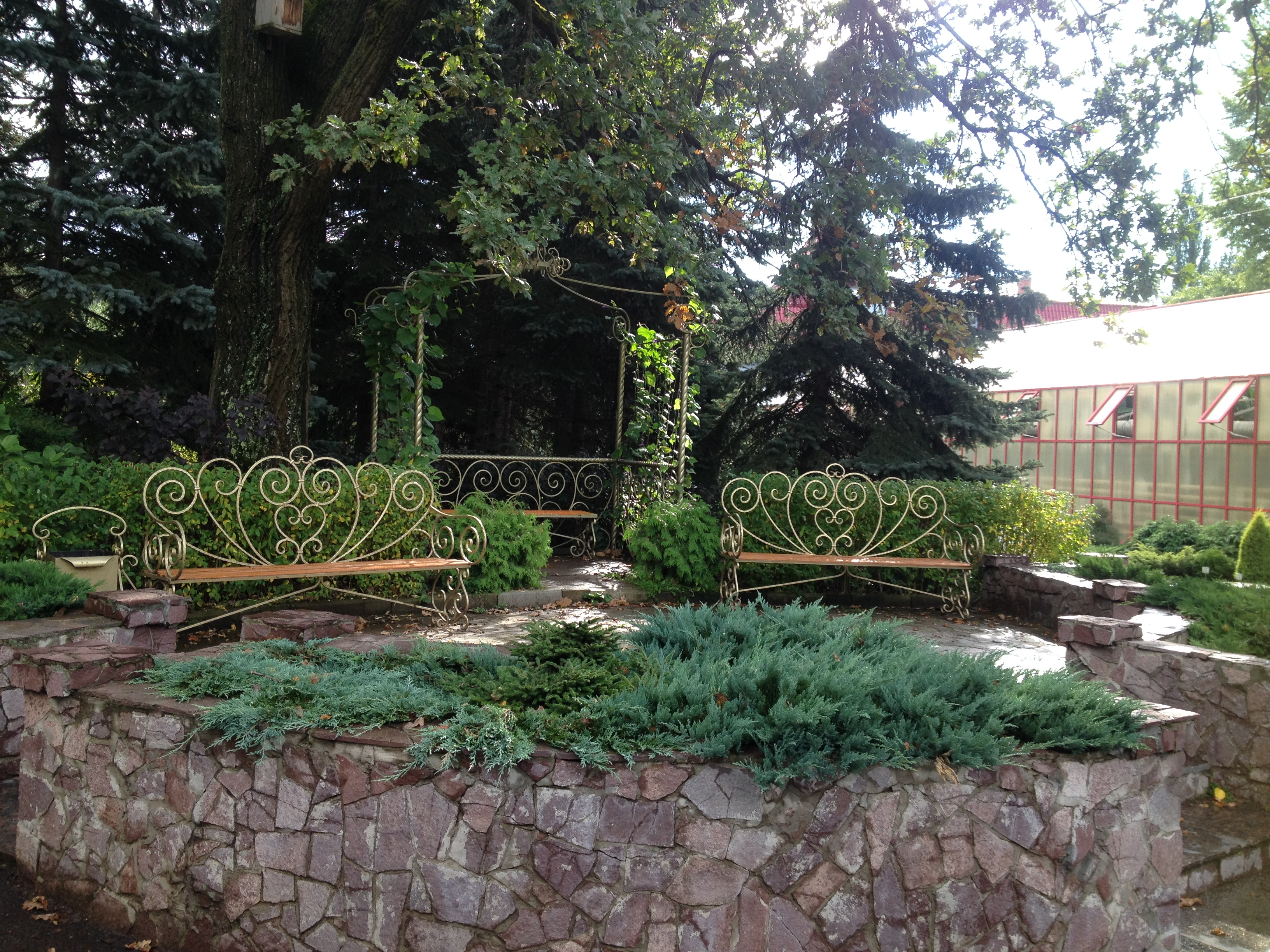 Ботанический сад-институт Уфимского научного центра РАН: Уфа, Башкортостан This image is related to the protected area of Russia number 0200217